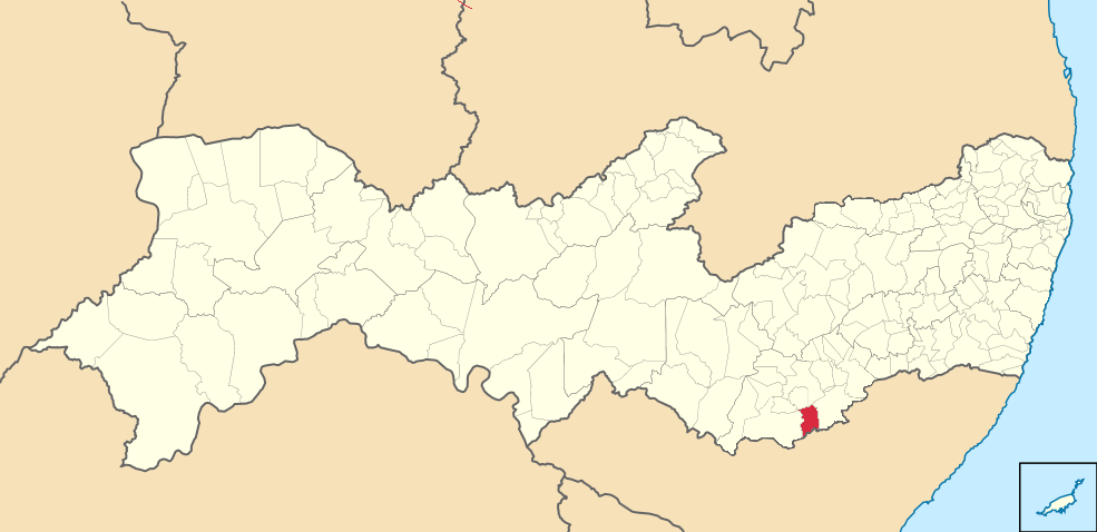 Mapa de Lagoa do Ouro (2)